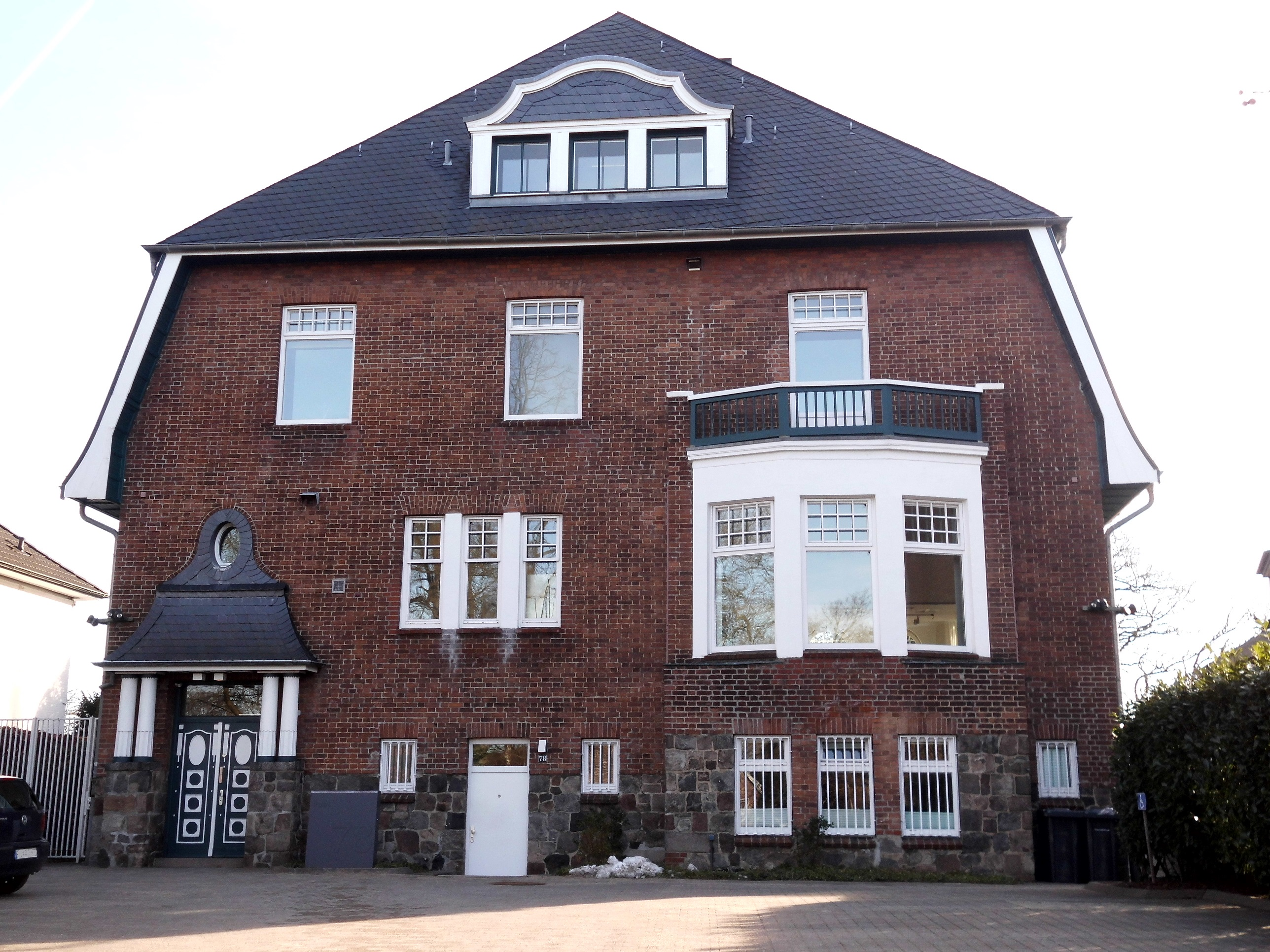 ehemaliges Gästehaus der Landesregierung im Kieler Niemannsweg 78, heute von der Hermann-Ehlers-Stiftung genutzt